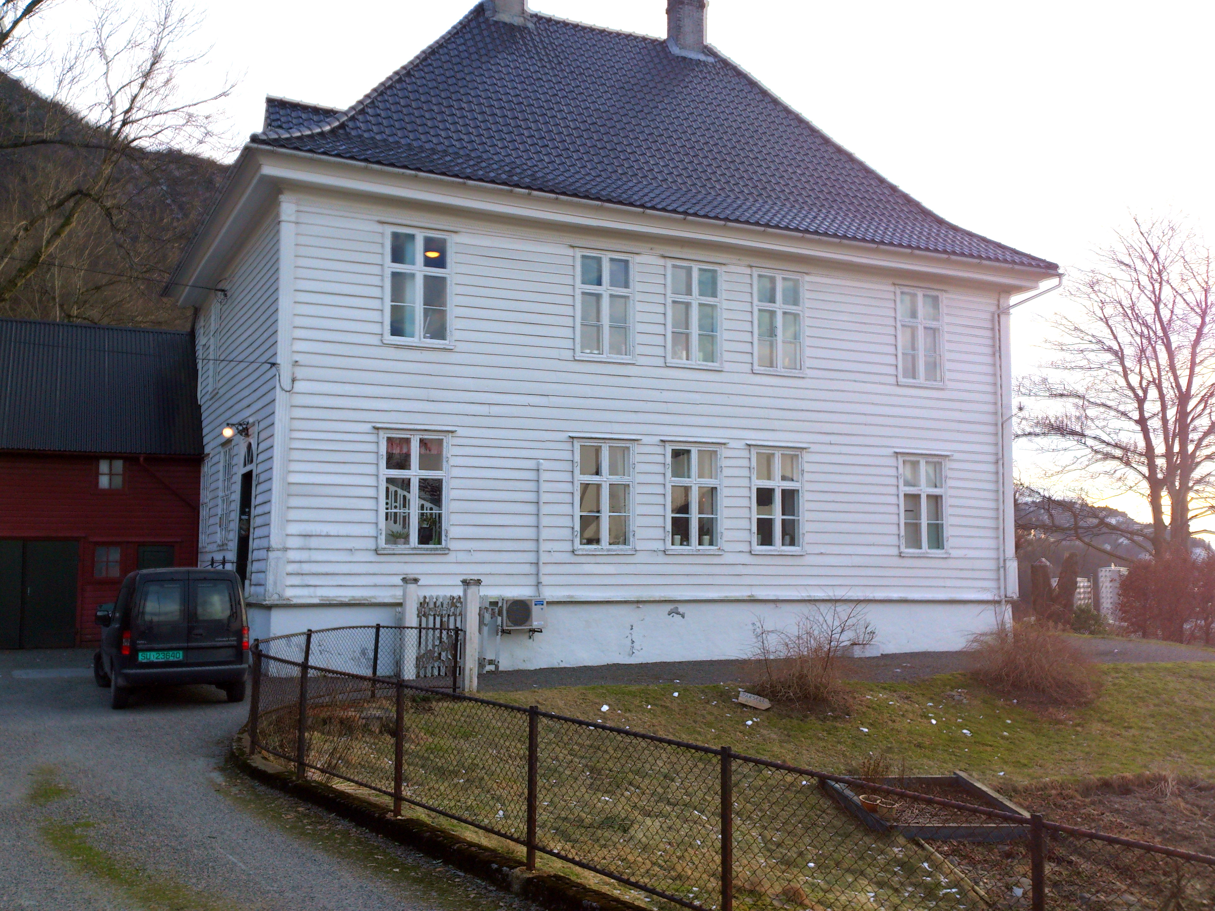 Landås hovedgård/lystgård. Den eldste delen av huset er fra mellom 1664 og 1680. I dag eies huset av Bergen kommune og brukes som prestebolig for Landås menighet.